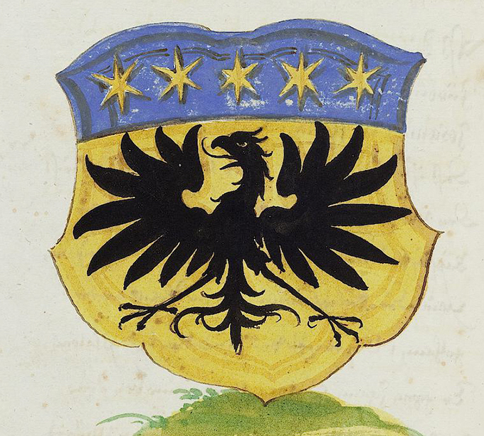 Amtswappen von Grüningen, heute Markgröningen, von Wolleber (1591)